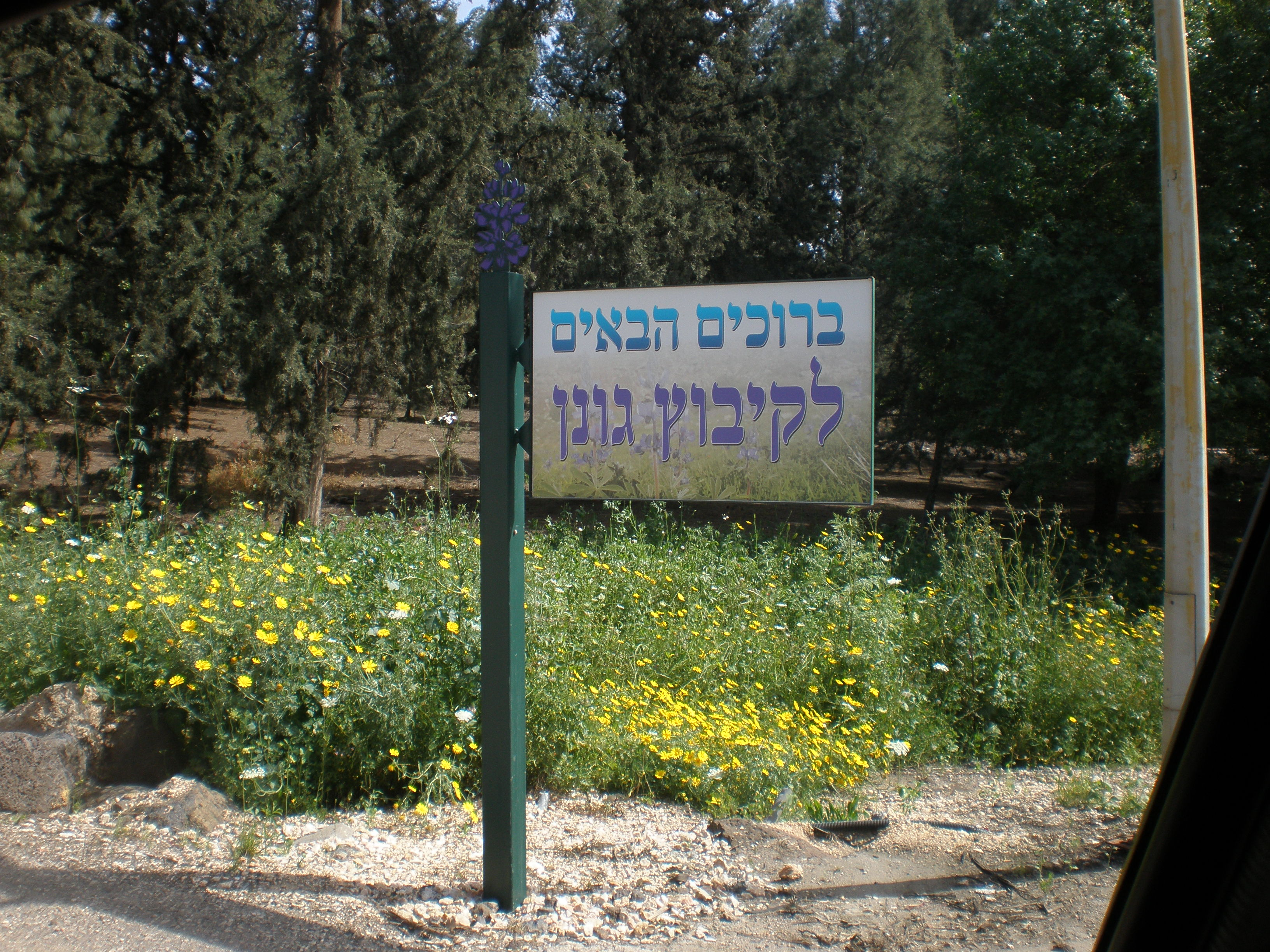 הכניסה לקיבוץ גונן